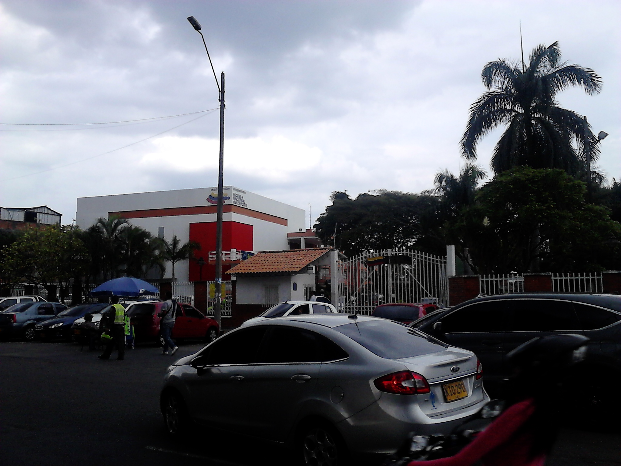 La Escuela Nacional del Deporte, cerca de las canchas panamericanas Esta fotografía fue tomada en el municipio colombiano con código 76001.